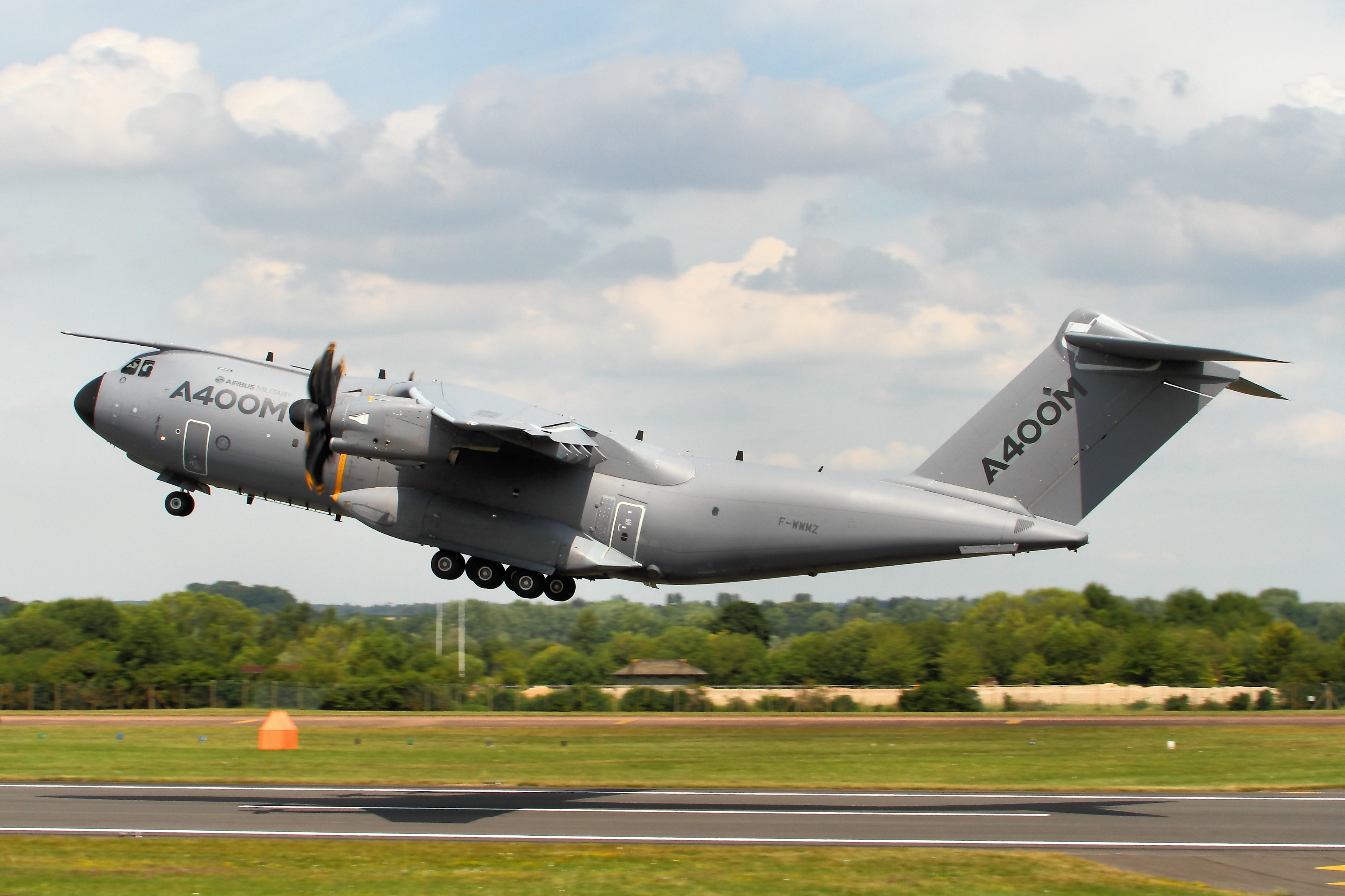 A400M - RIAT 2014